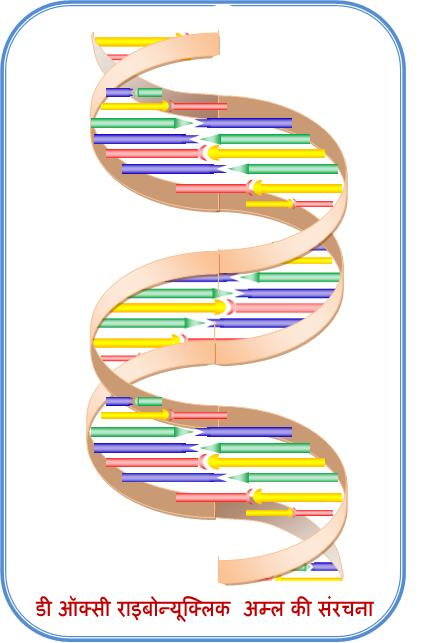 श्रेणी:डी एन ए